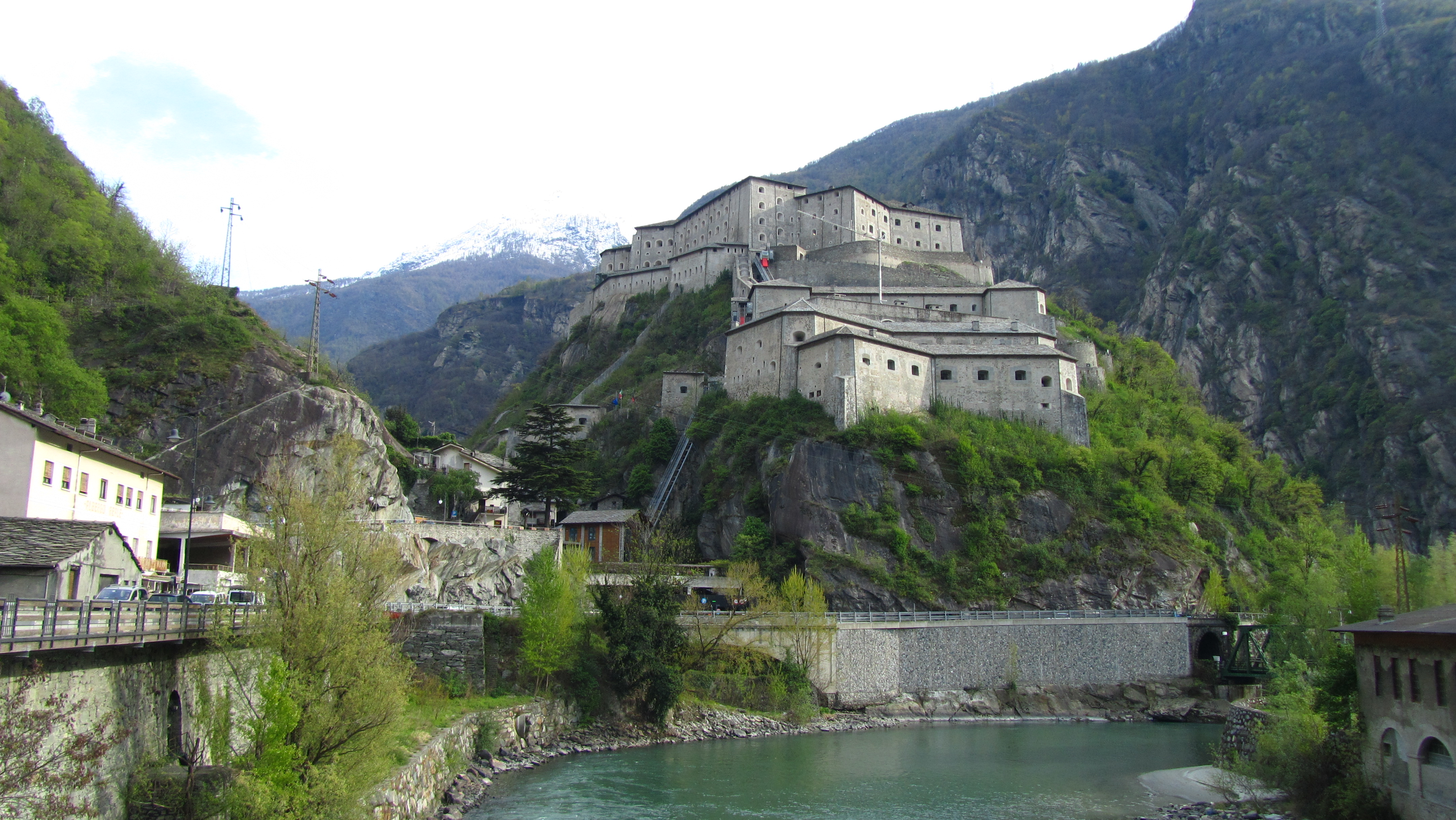 Forte di Bard visto dal ponte sulla Dora Baltea di Hone This is a photo of a monument which is part of cultural heritage of Italy.